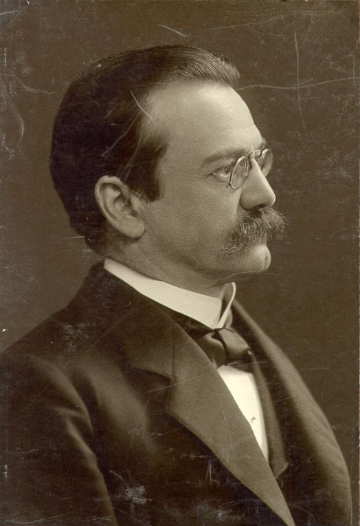 Emil Thomas (1858–1923), deutscher Klassischer Philologe, Privatdozent (ab 1911 Titularprofessor) an der Universität Berlin